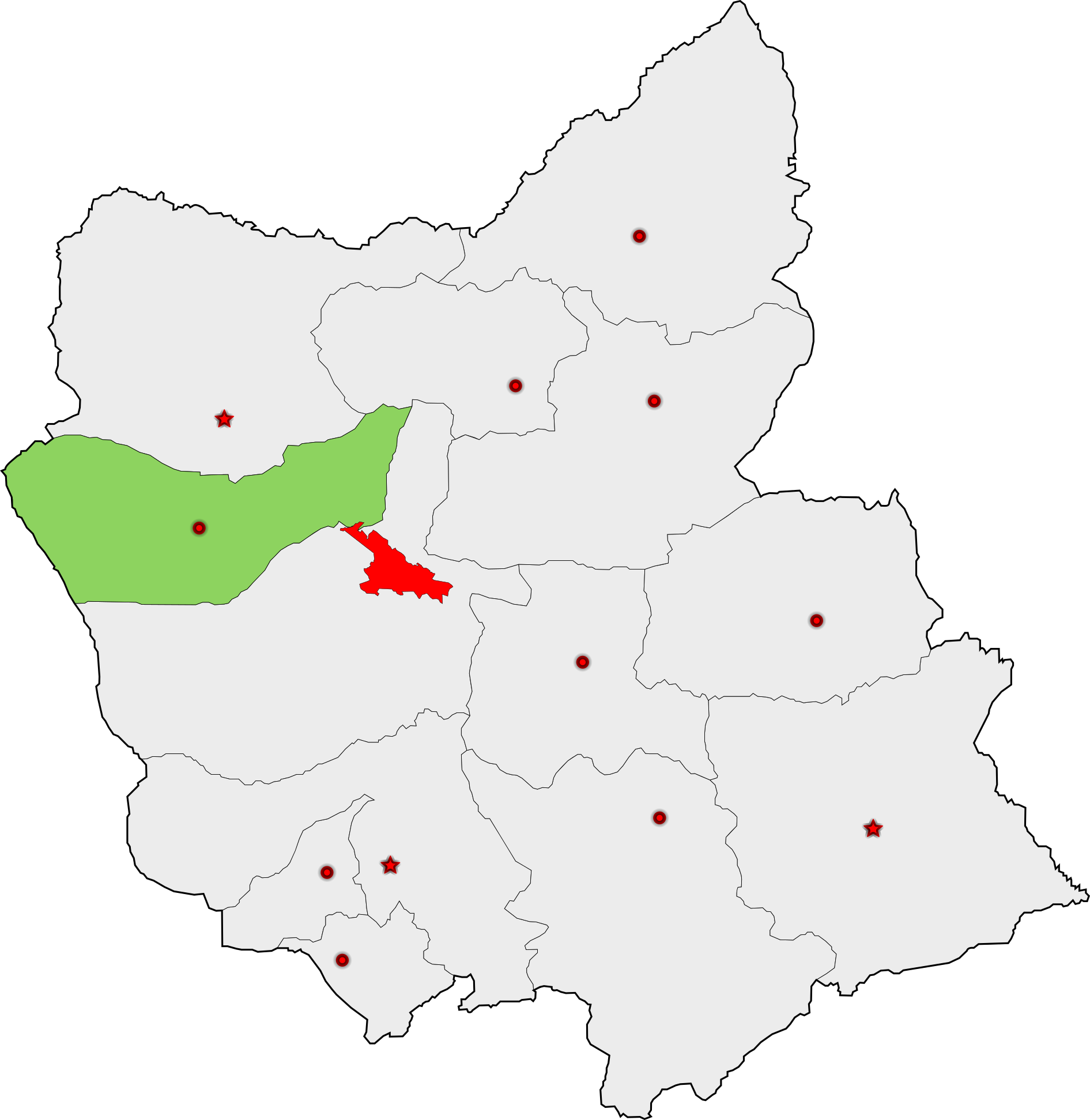 حوزهٔ انتخاباتی شبستر برای انتخابات مجلس شورای اسلامی